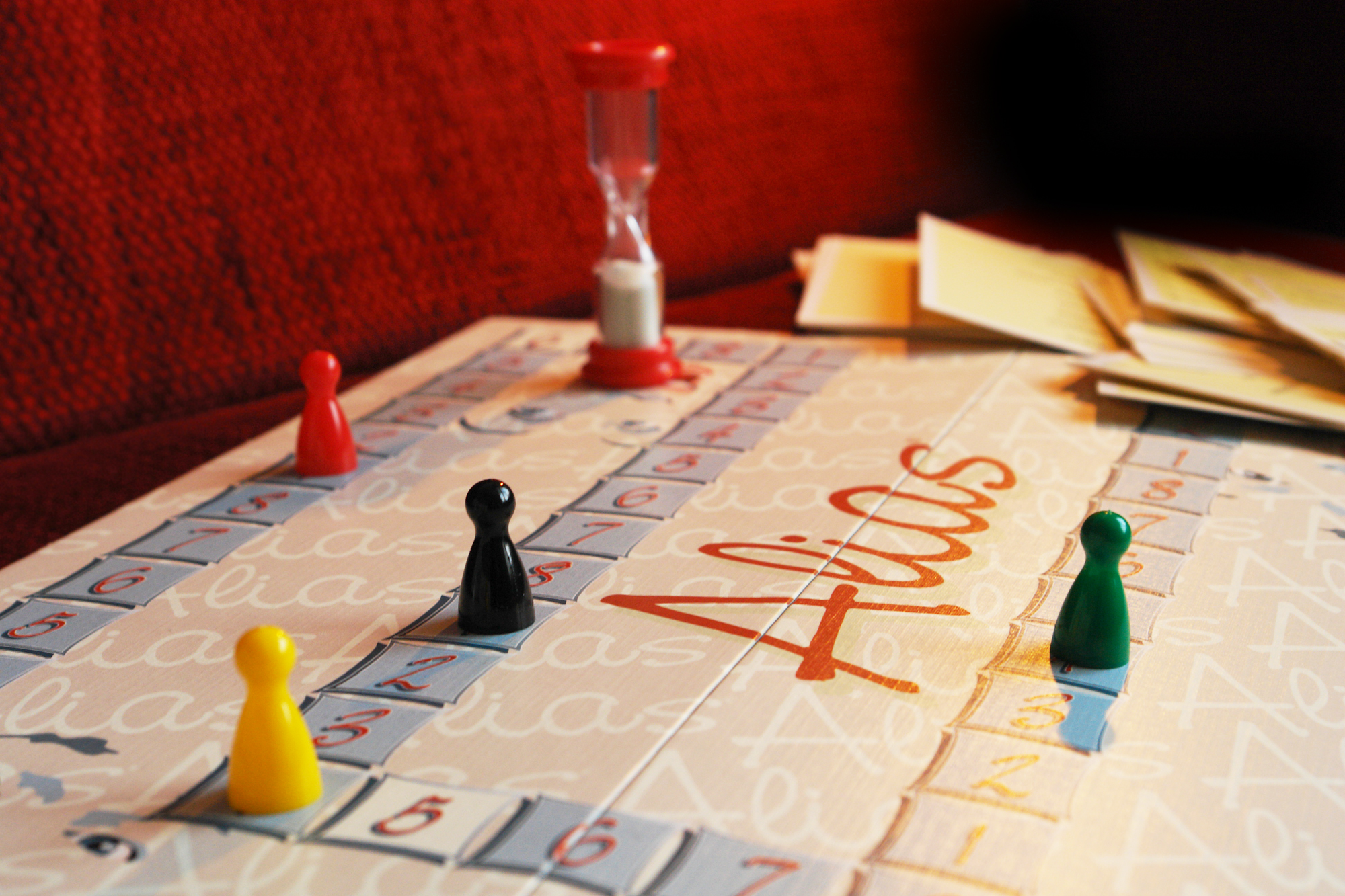 „Alias“ žaidimo lenta